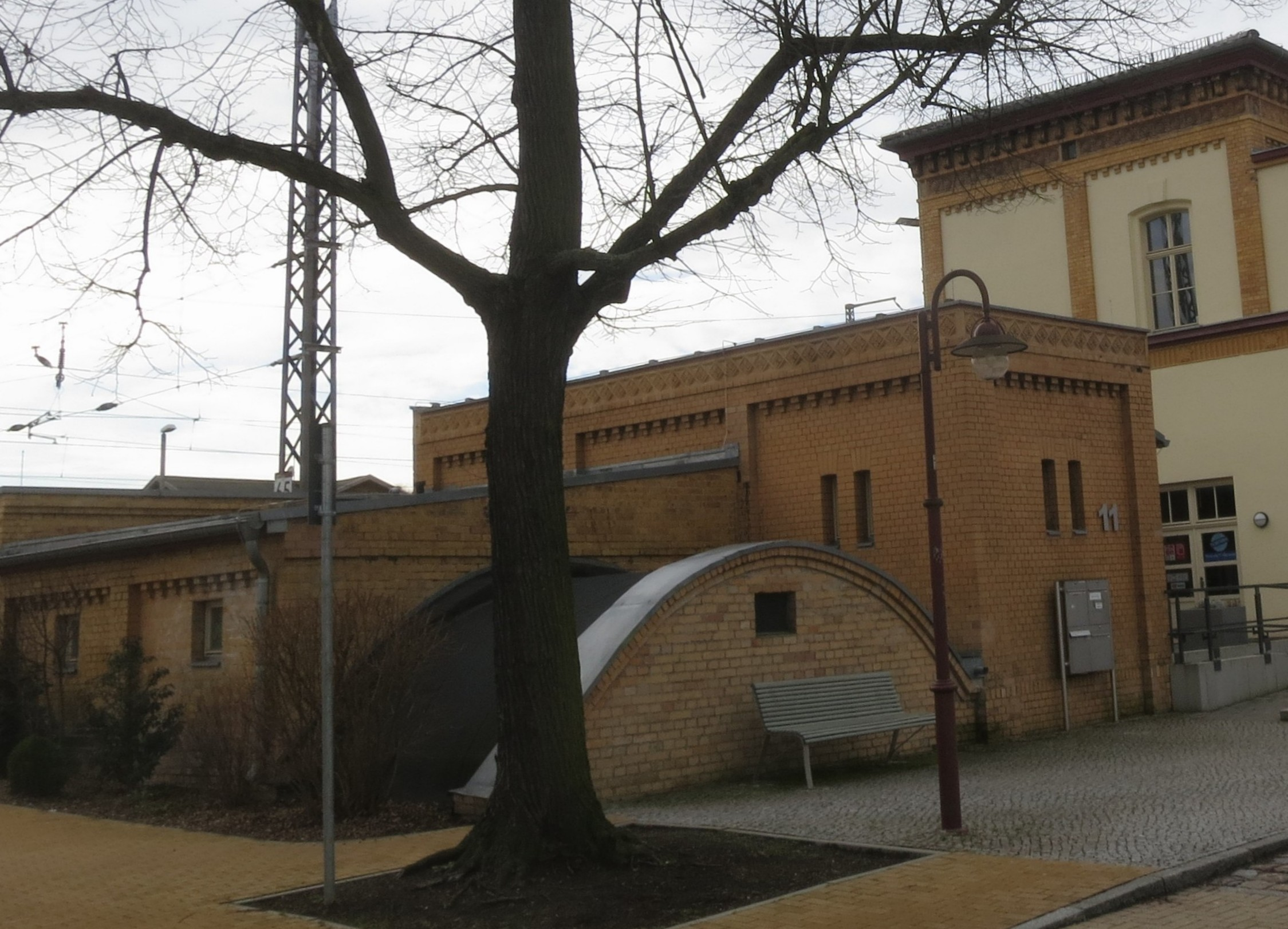 Bahnhof Bad Belzig, Toilettenhäuschen und Eiskeller neben dem Empfangsgebäude